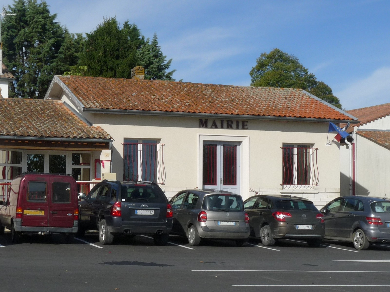 Mairie d'Ozillac, Charente-Maritime, France